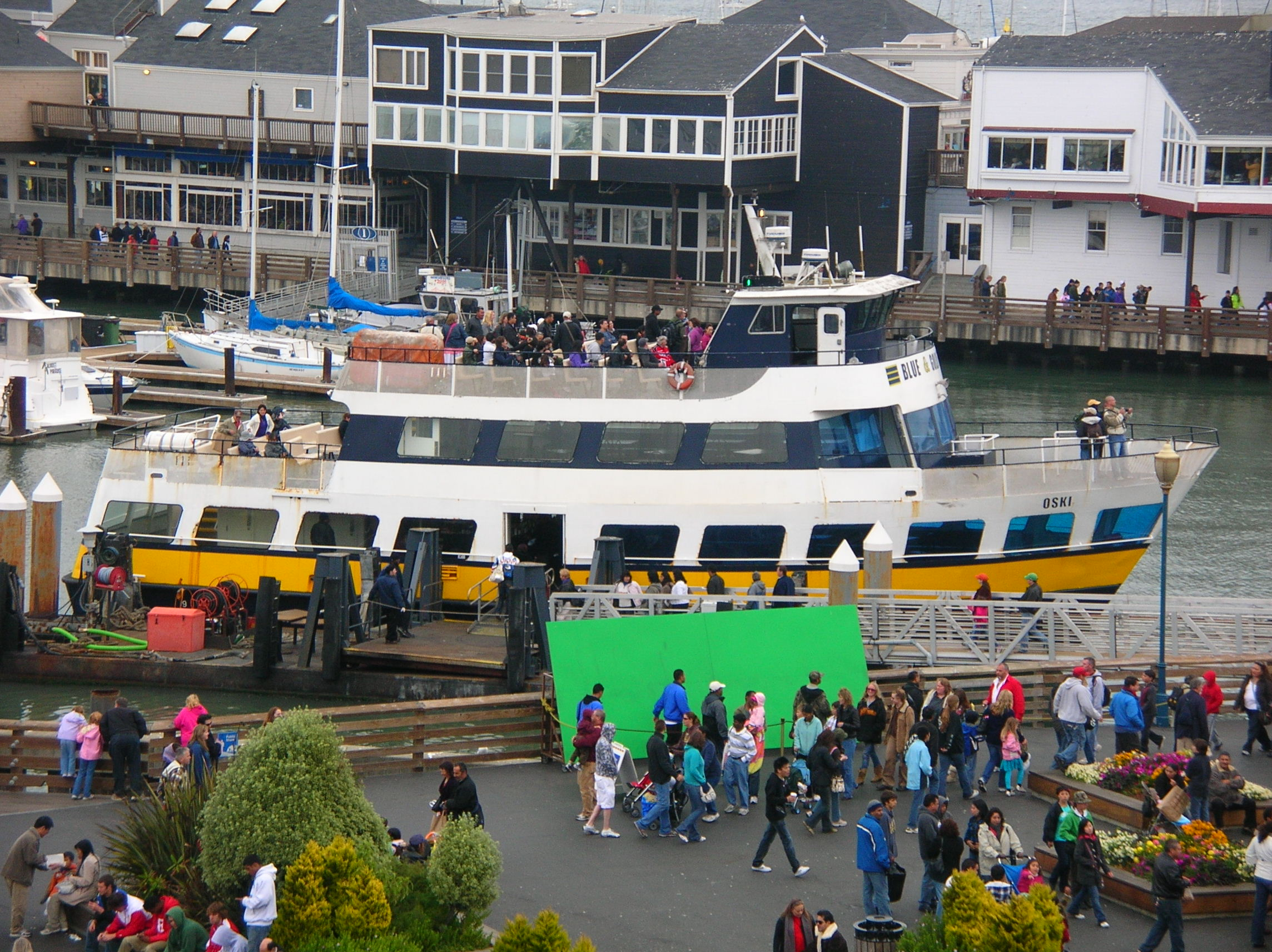 Blue & Gold Fleet ferry Oski during San Francisco Fleet Week.